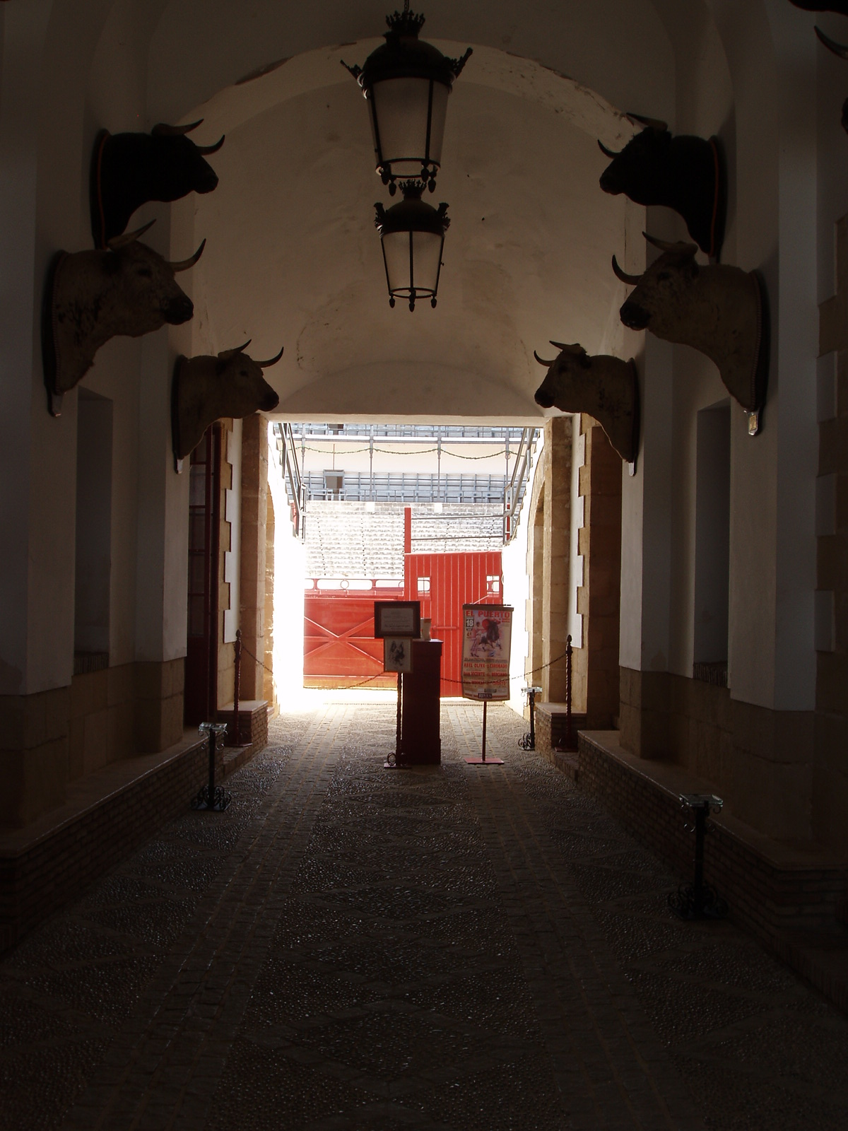 Plaza de Toros de El Puerto de Santa María